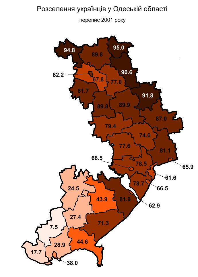 Розселення українців в Одеській області за переписом 2001 р. / Ukrainians in Odesa oblast, 2001 census